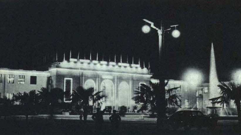 1963-02 1963年 广西展览馆